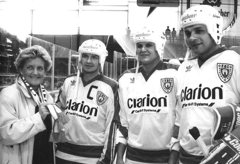 ADN- Bernd Settnik-7.10.90-Berlin: Eishockey-Bundesliga- Mit einem bunten Dynamo-Fan-Schal überraschte der Mannschaftskapitän des EHC, Harald Kuhnke (2.v.l.), die FDP-Landesvorsitzende Carola von Braun (l.), die mit ihrer Familie zum Spiel EHC Dynamo Berlin - SB Rosenheim gekommen war, um die beiden neuen sowjetischen Spieler Sergej Jaschin (2.v.r.) und Wladimir Schaschow (r.) zu ihrem ersten Spiel zu begrüßen.